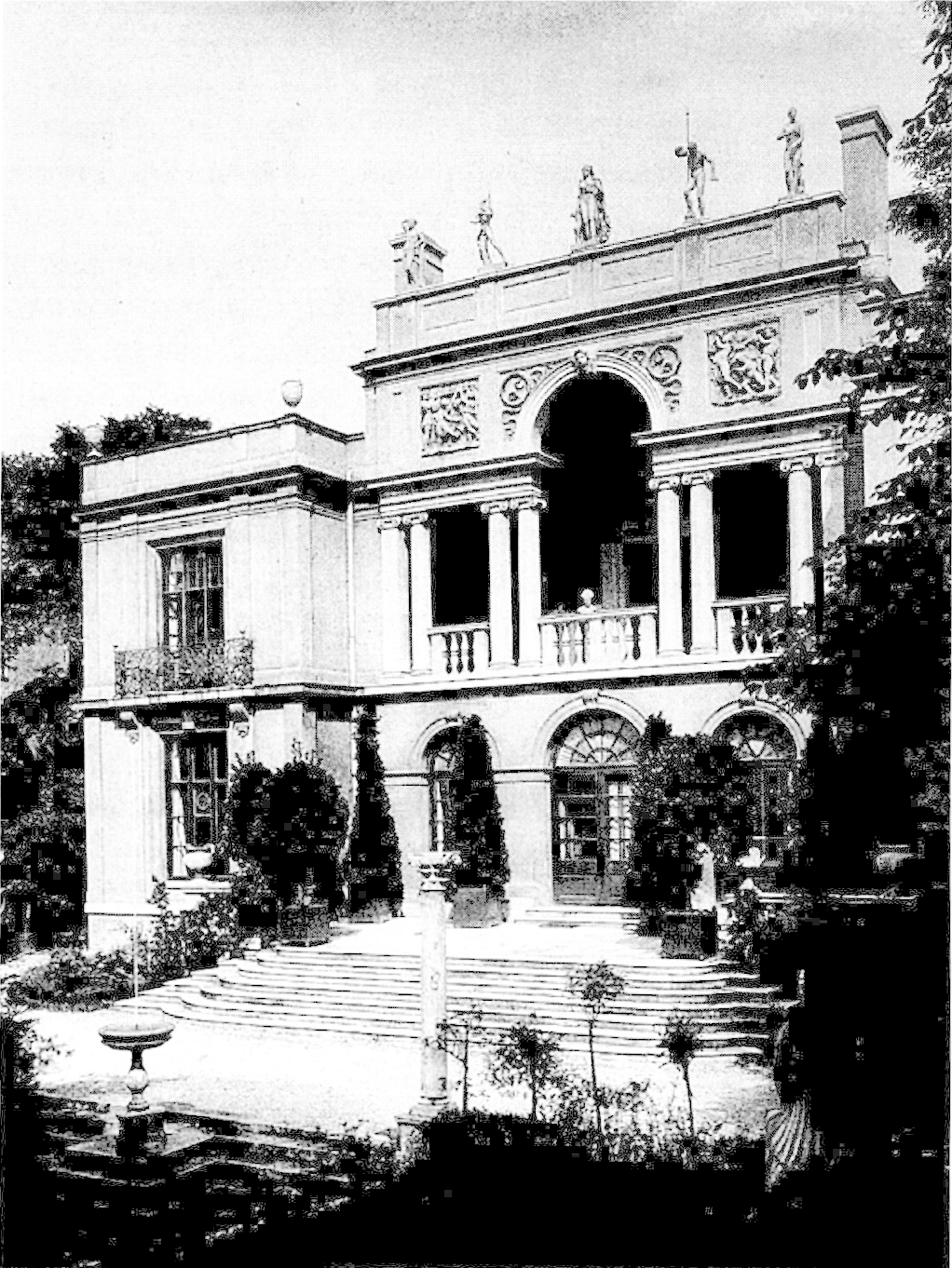 Gartenseite der Kaulbach-Villa, München, Kaulbachstraße 15. Architekt: Gabriel von Seidl, Foto von 1898